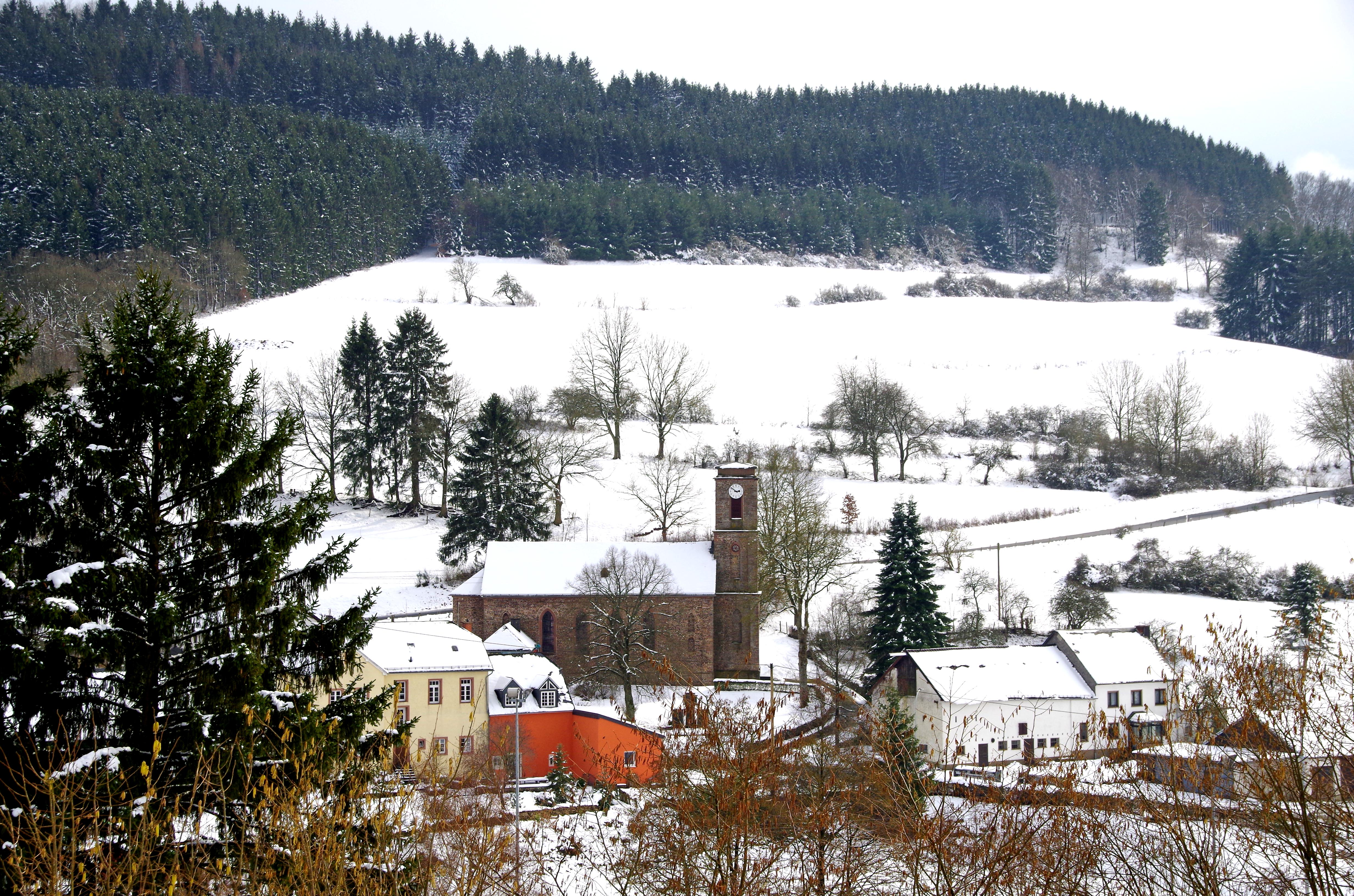 St. Dionysius (Gondenbrett), Blick von Norden